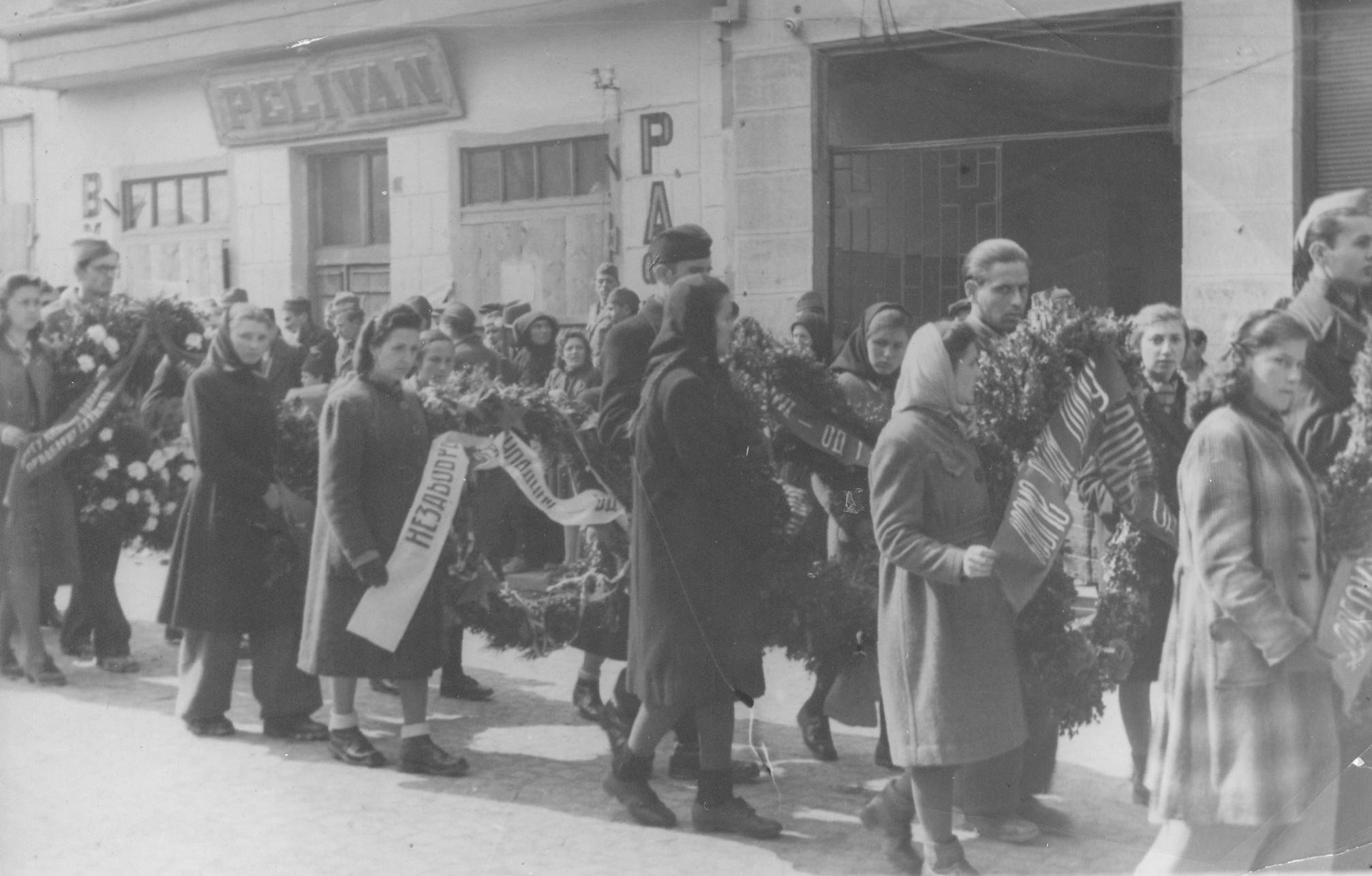 Ispraćaj posmrtnih ostataka Miladina Popovića iz Prištine 14. marta 1945. godine